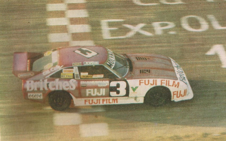 Club Argentino de Pilotos Gustavo Der Ohanessian 1985.